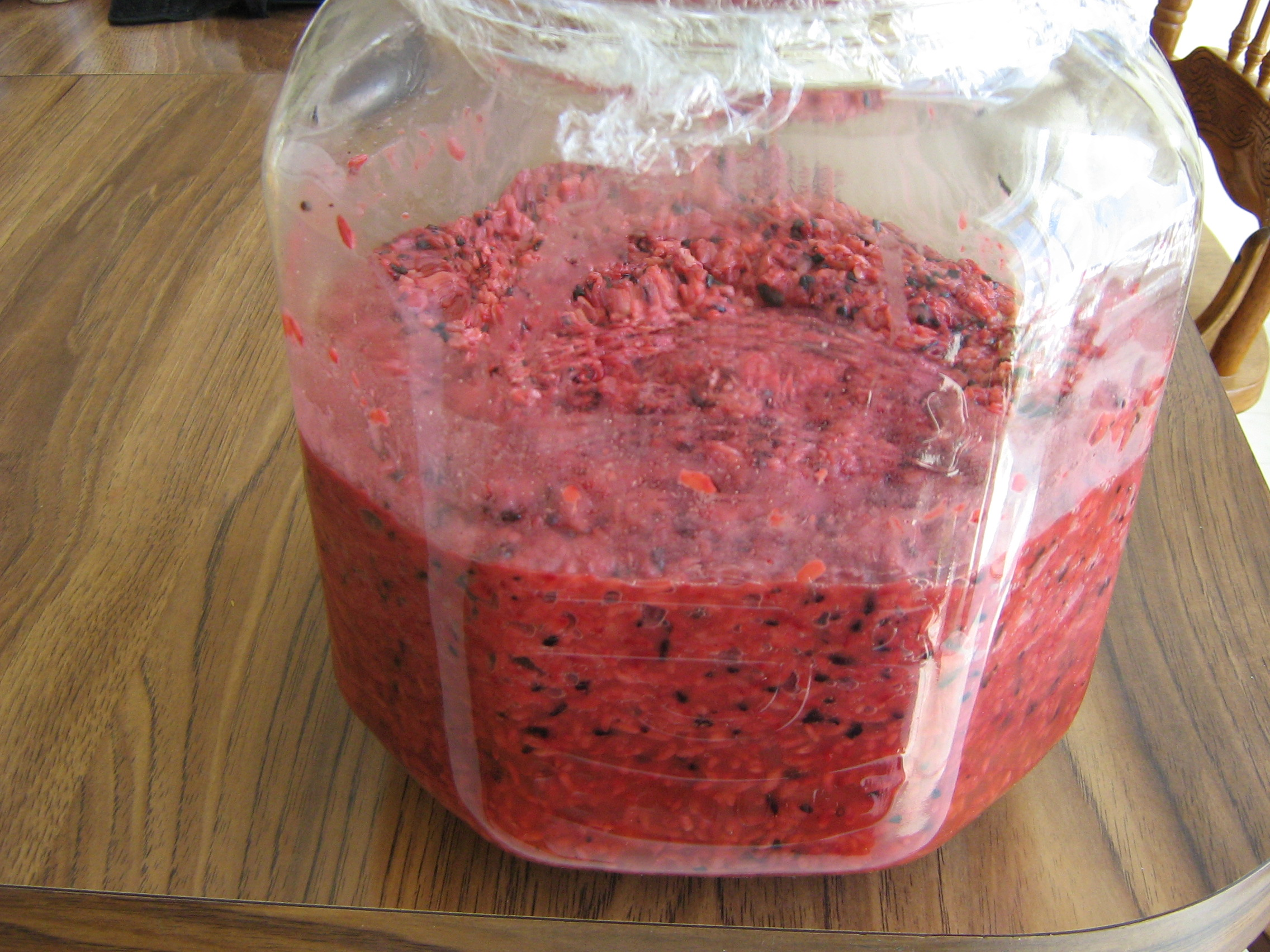 红糟